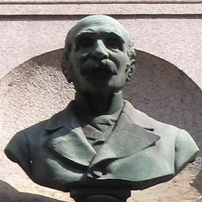 Asti. busto di Isacco Artom senatore del regno d'Italia.